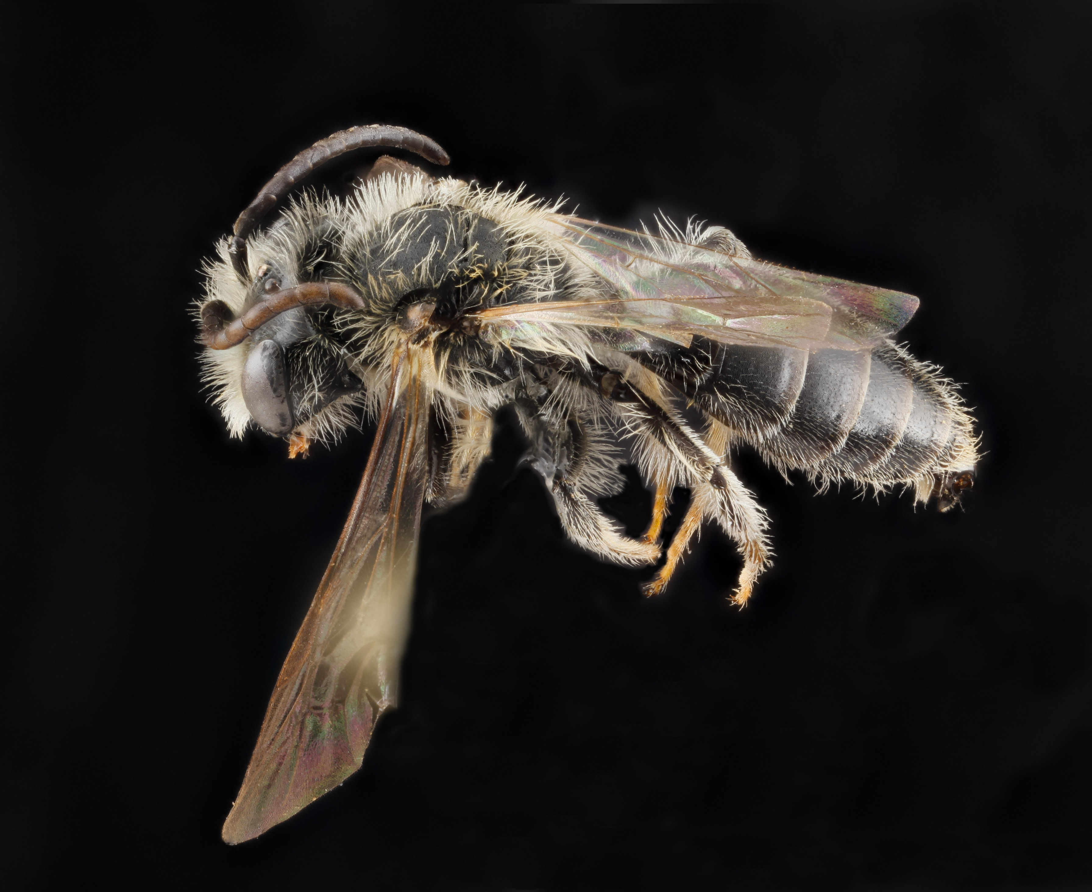 Andrena banksi, male